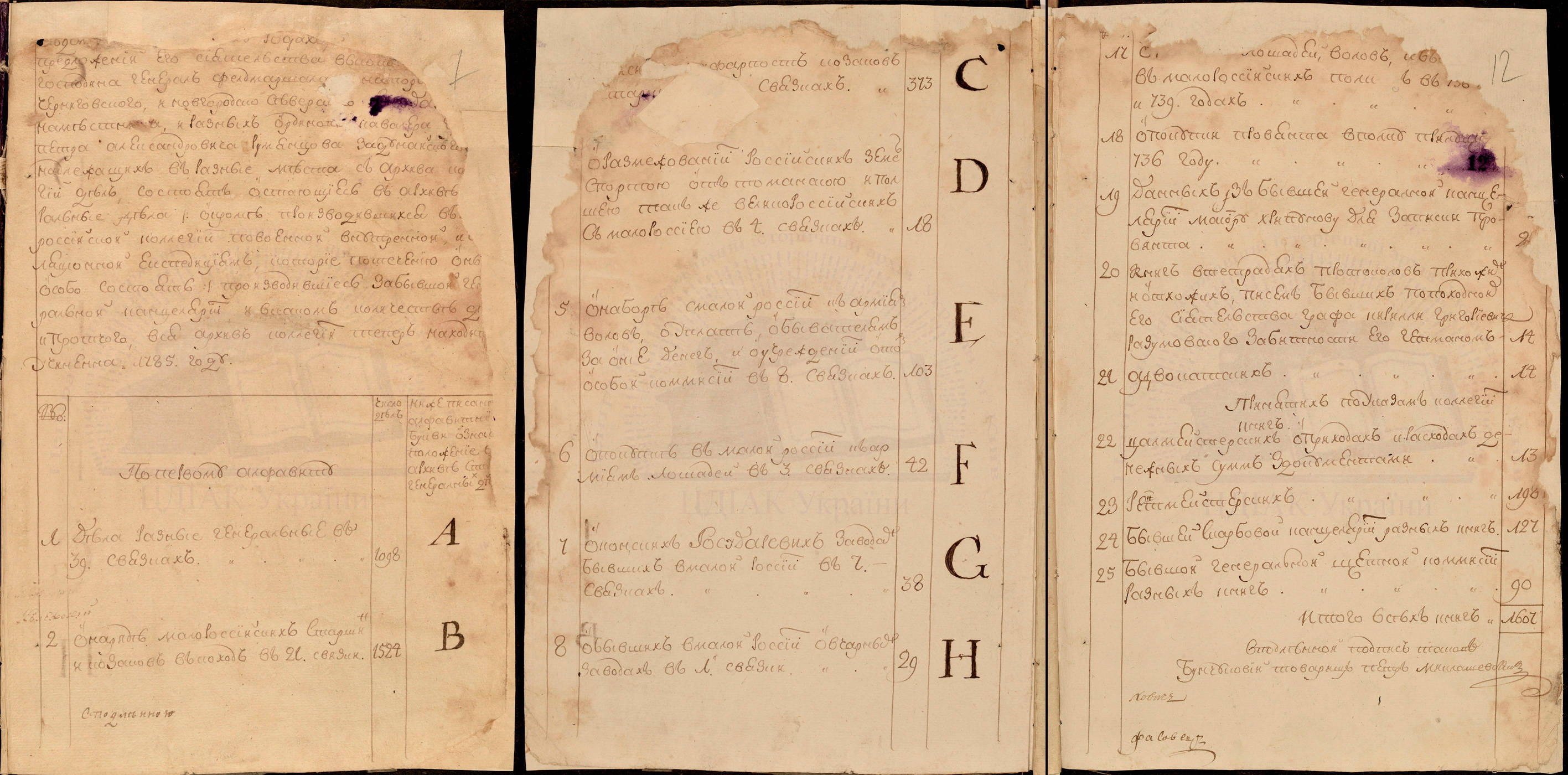 1785 р., липня […]. – Алфавітний реєстр справам (доданий до рапорту бунчукового товариша Петра Миклашевського та асесора Івана Войцеховича): “вѣдомость, во скольку родах состоят разобранные дѣла, производившиеся в Малороссійской коллегіи по военной, внутренней и апелляціонной експедиціям … производившіеся за бывшей Генеральной канцеляріи и в каком количествѣ дѣл …”. ЦДІАК України, ф. 736, оп. 1, спр. 672, арк. 7 і зв.,12.